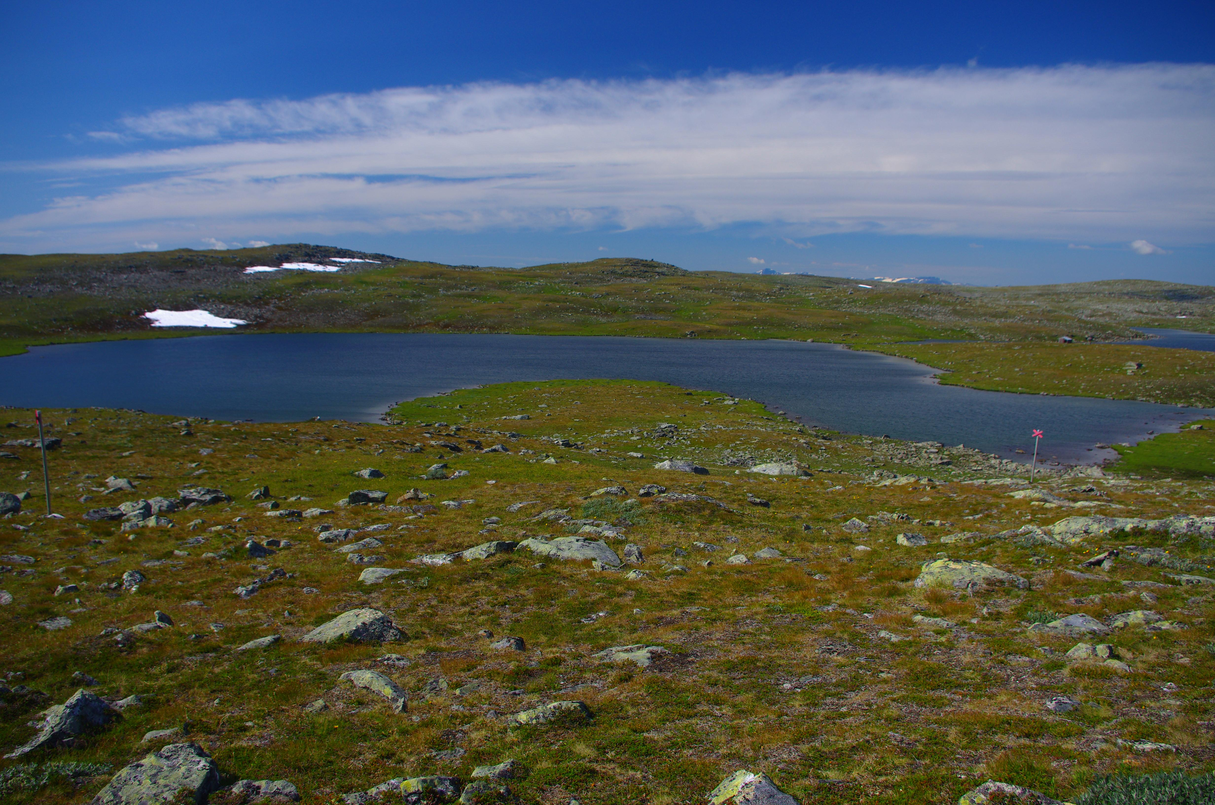 Tjålmur eller Tjålmure är en sjö i Sorsele kommun i Lappland i Sverige. Kungsleden passerar sjön.